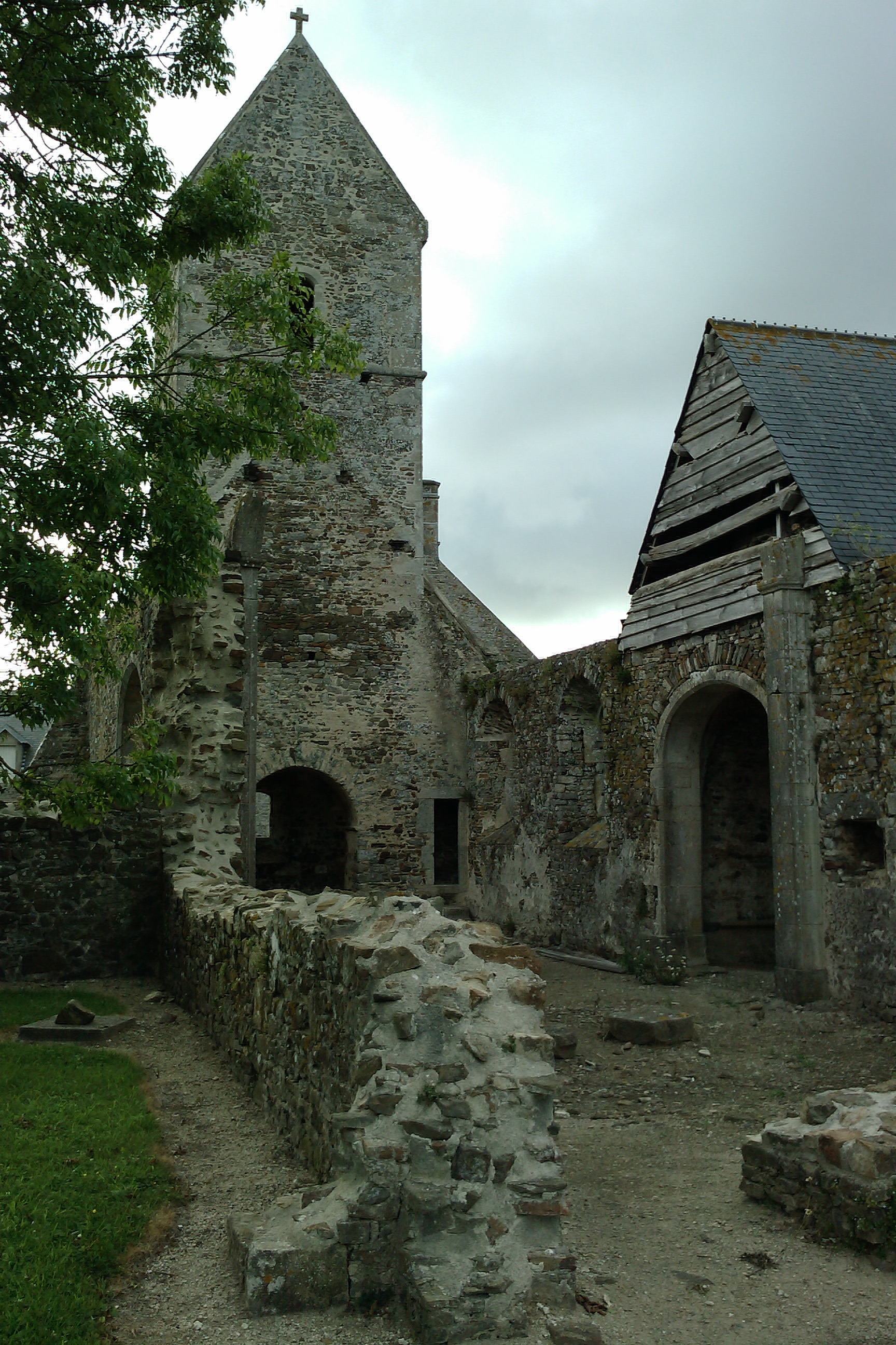 Vielle église d'Omonville à Denneville